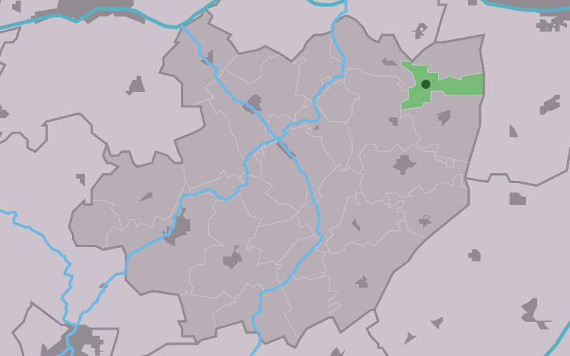 Kaartsje fan himrik fan Bears